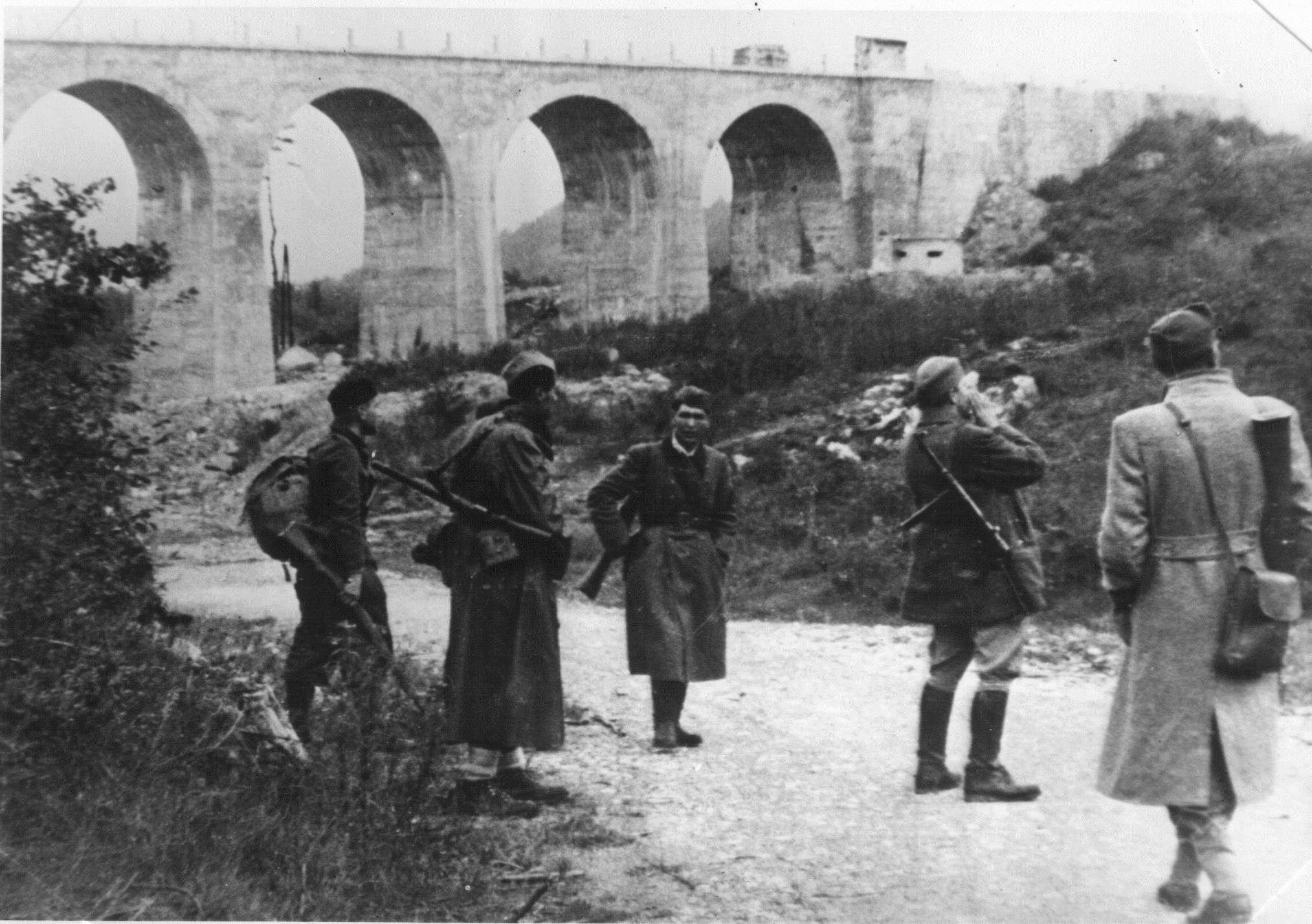 Štampetov most pred rušenjem